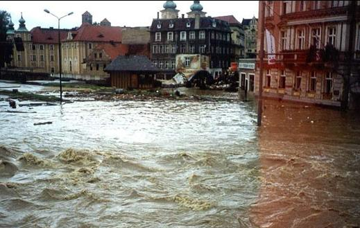 Plac Jedności w Kłodzku podczas powodzi z 1997 roku